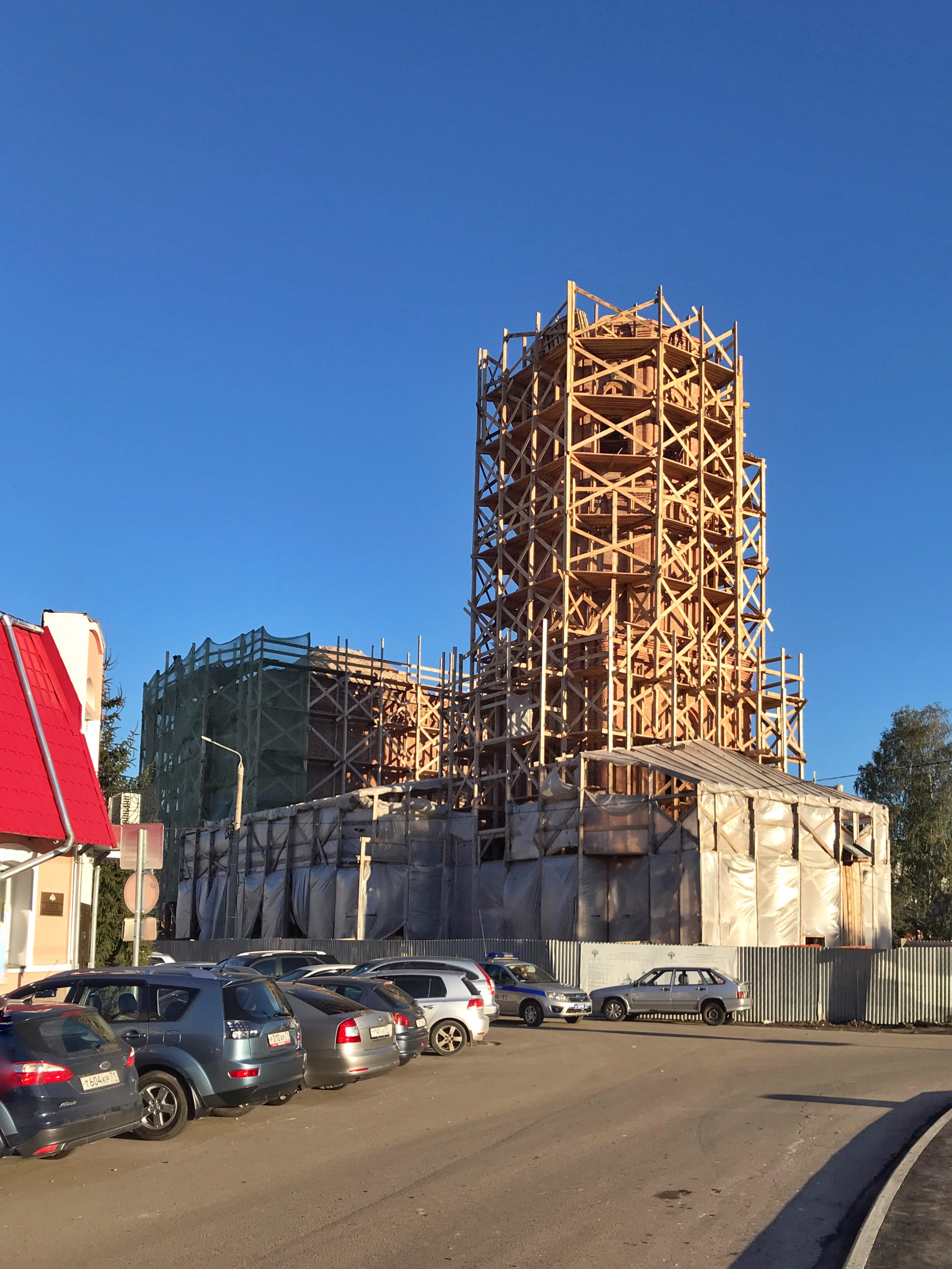 Church of the Protection of the Theotokos